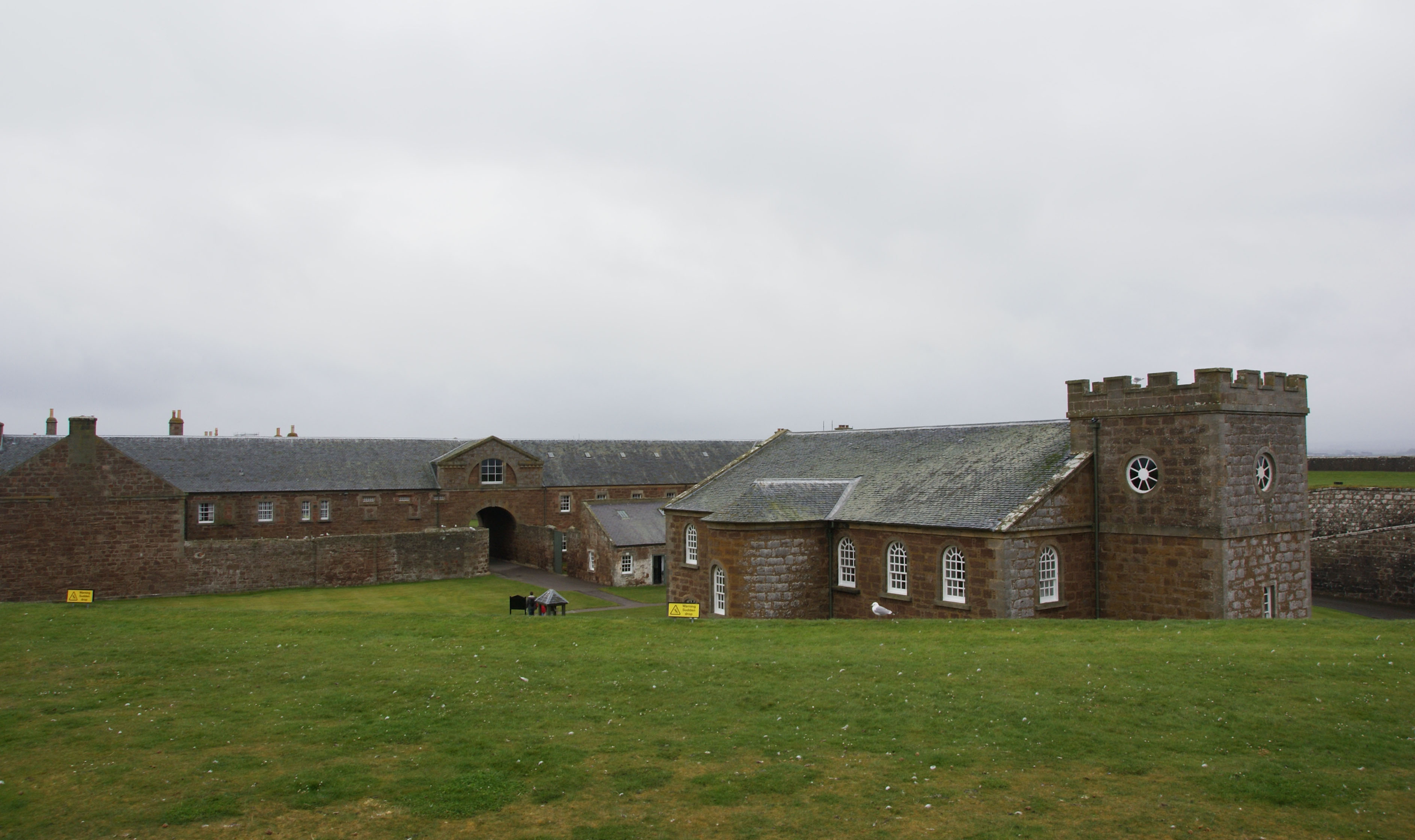 Fort George, Ardersier (Scotland) - chapel